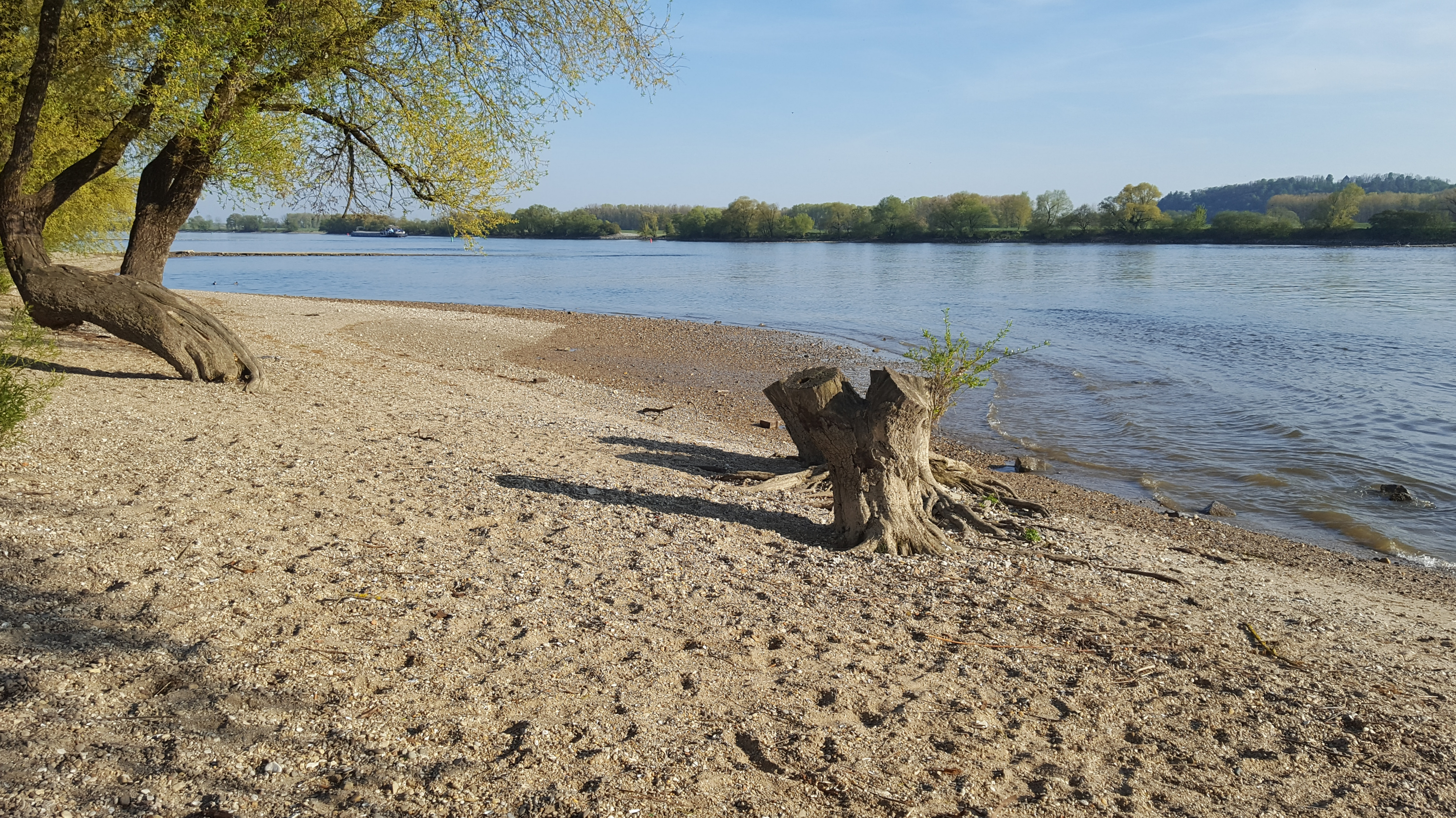 Teilgebiet des vorgeschlagenen UNESCO-Welt-Naturerbegebiets